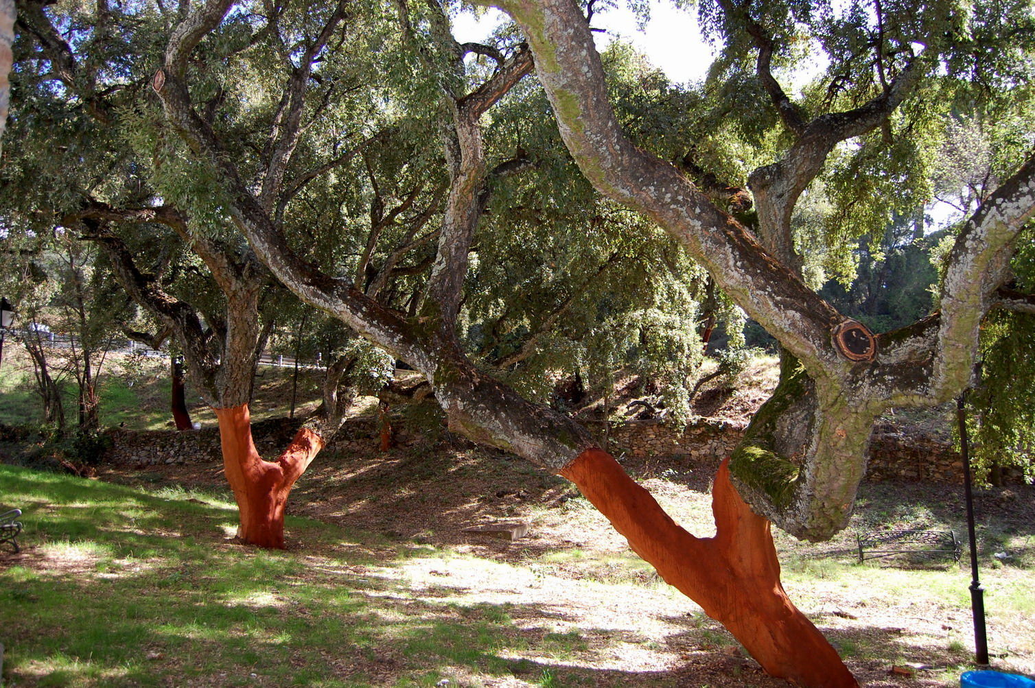 Alcornoque